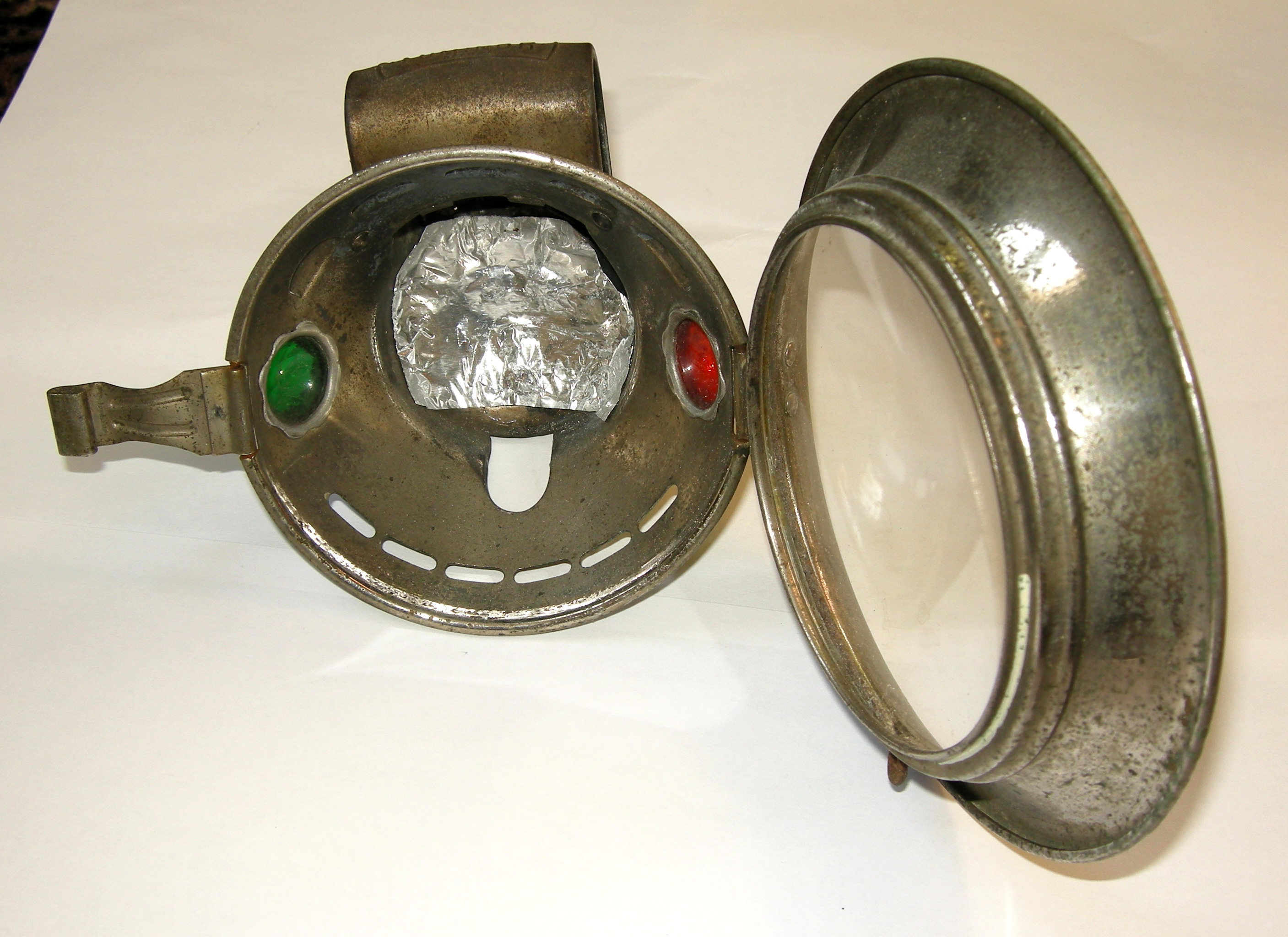 Réflecteur de lampe à acétylène.